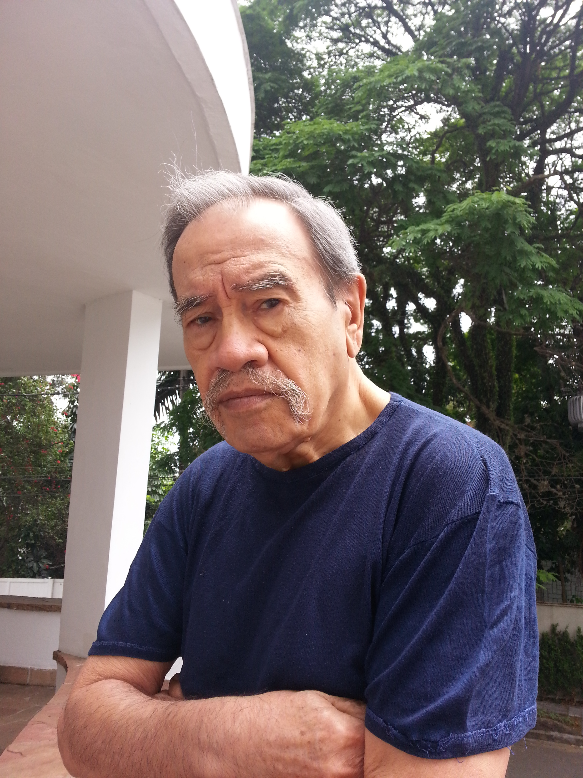 Juan José Balzi (1933-2017)